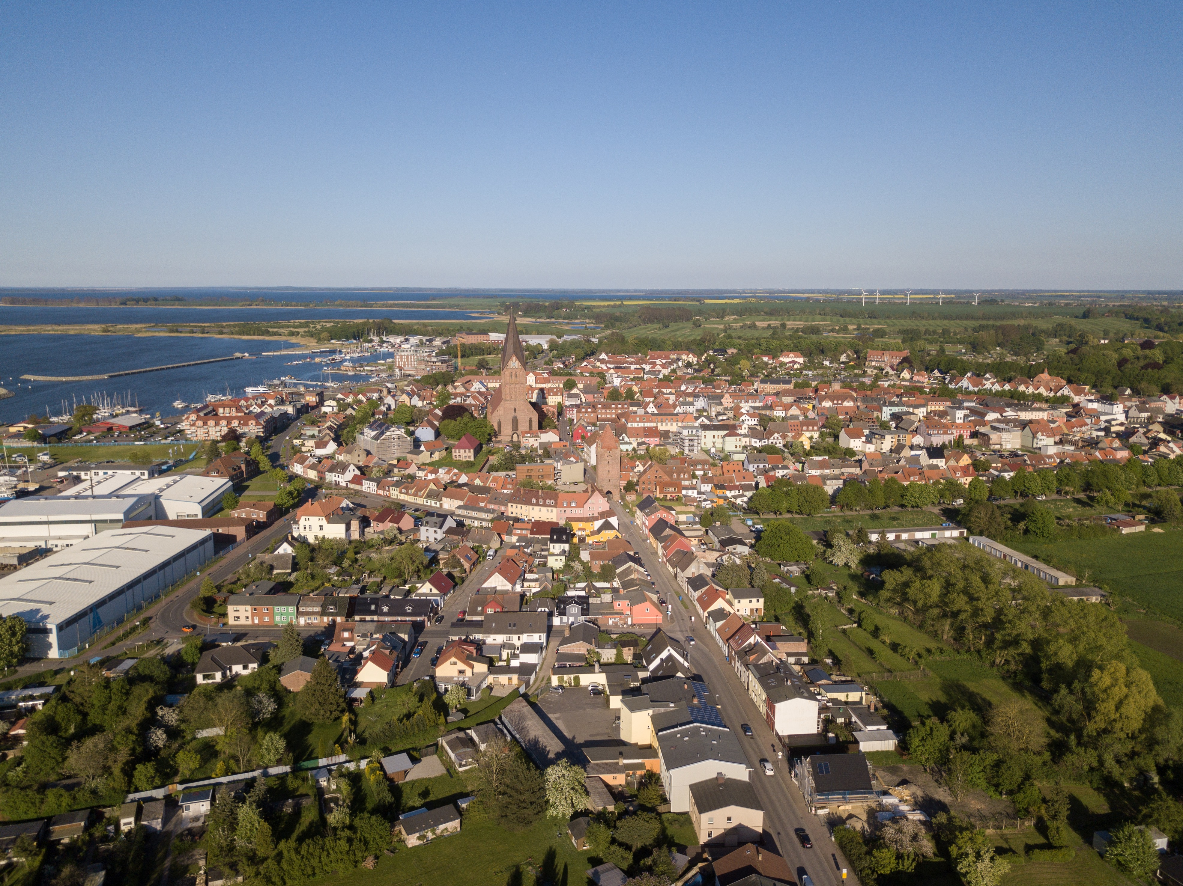 Blick auf die Gemeinde Barth in Mecklenburg-Vorpommern, mit dem Westtor und der Marienkirche in der Bildmitte und dem Bodden-Hafen links.